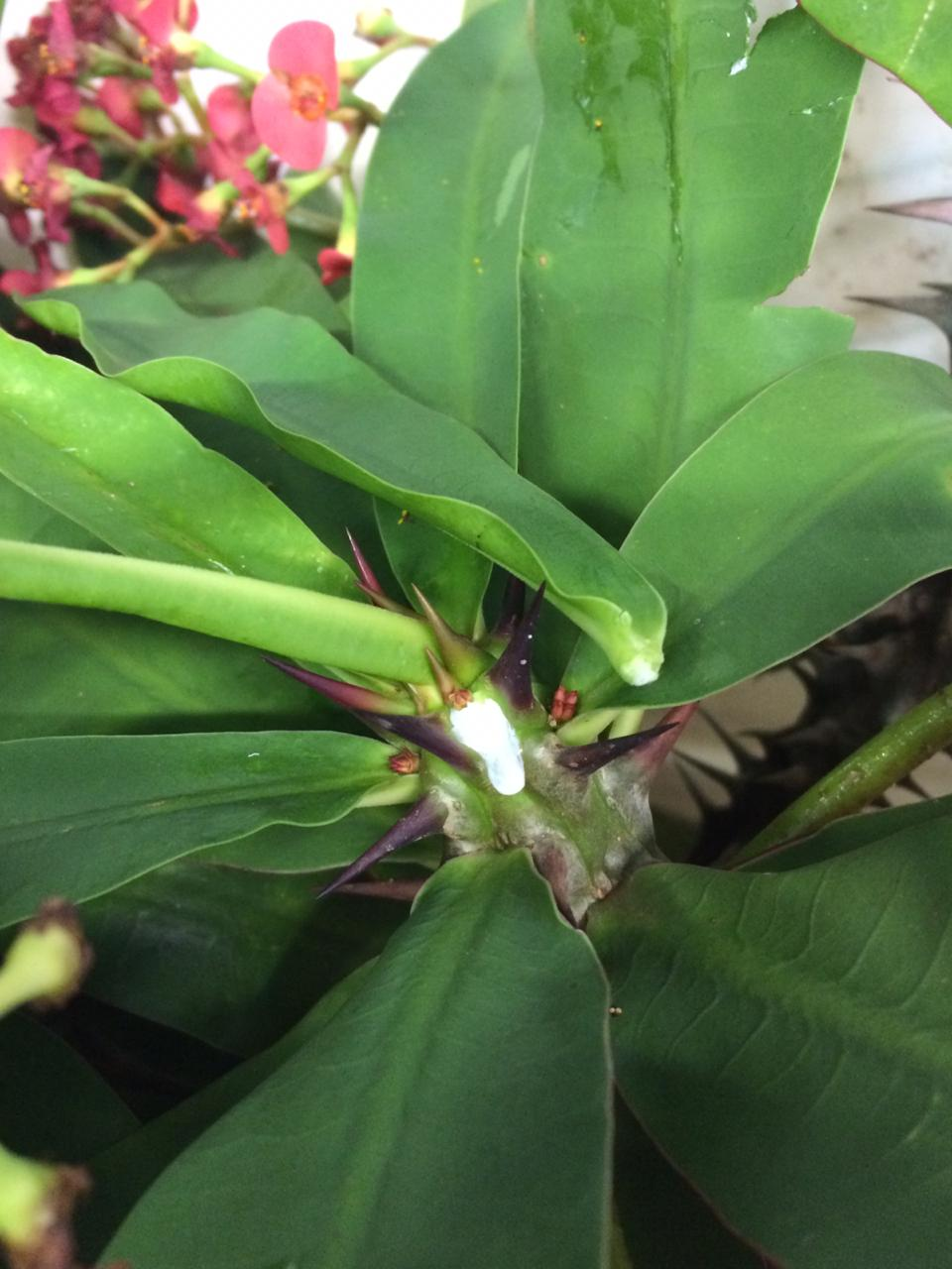 Essa imagem trata-se de uma espécie da família Euphorbiaceae, em que pode se observar a presença de látex quando esta sofre alguma injúria mecânica. É popularmente conhecida como coroa-de-cristo